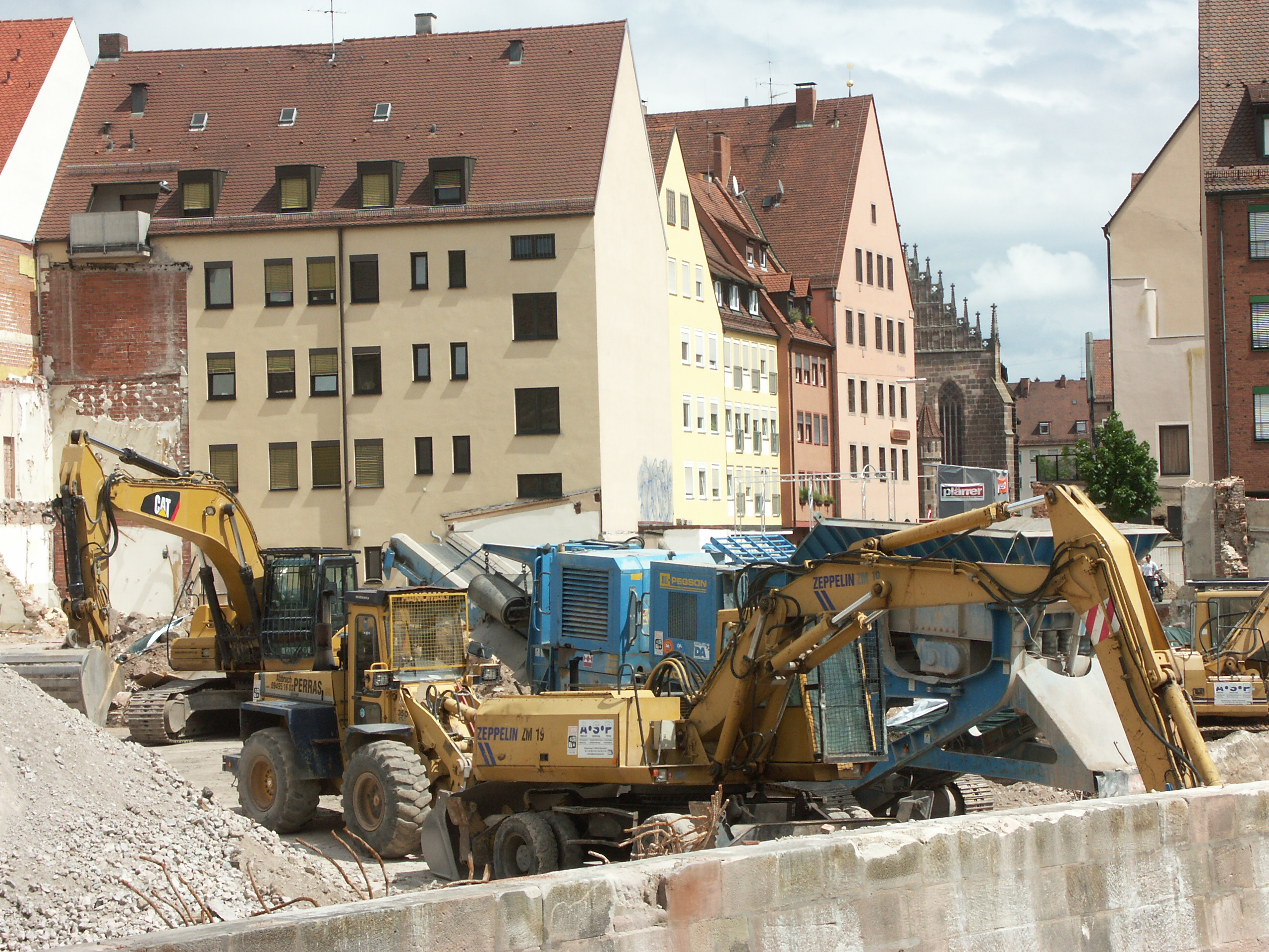 Abriss des Augustinerhof, Nürnberg 2008